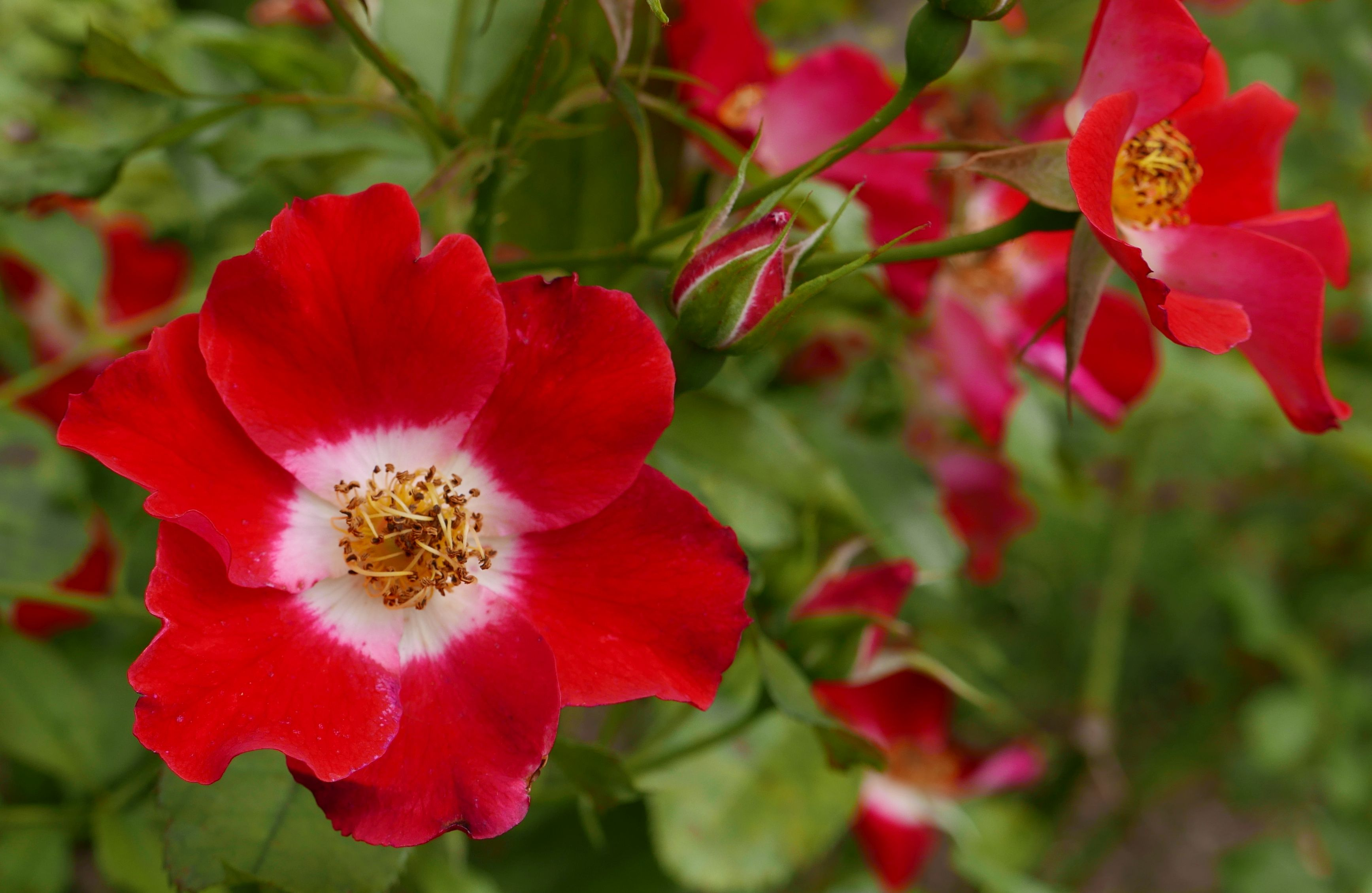 Rosa 'Eyepaint' McGredy 1976, Rosarium Sangerhausen, August 2017